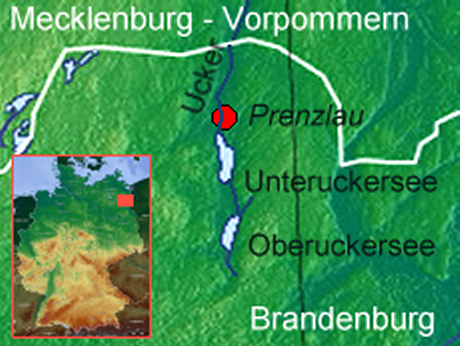 Map of the lakes "Ober- and Unteruckersee" in Brandenburg (Germany) - Karte "Uckerseen" in Brandenburg